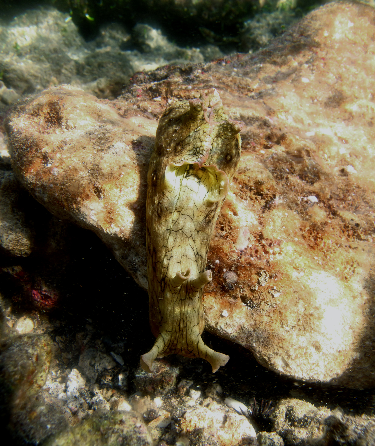 Le lièvre de mer Aplysia argus à la Réunion.